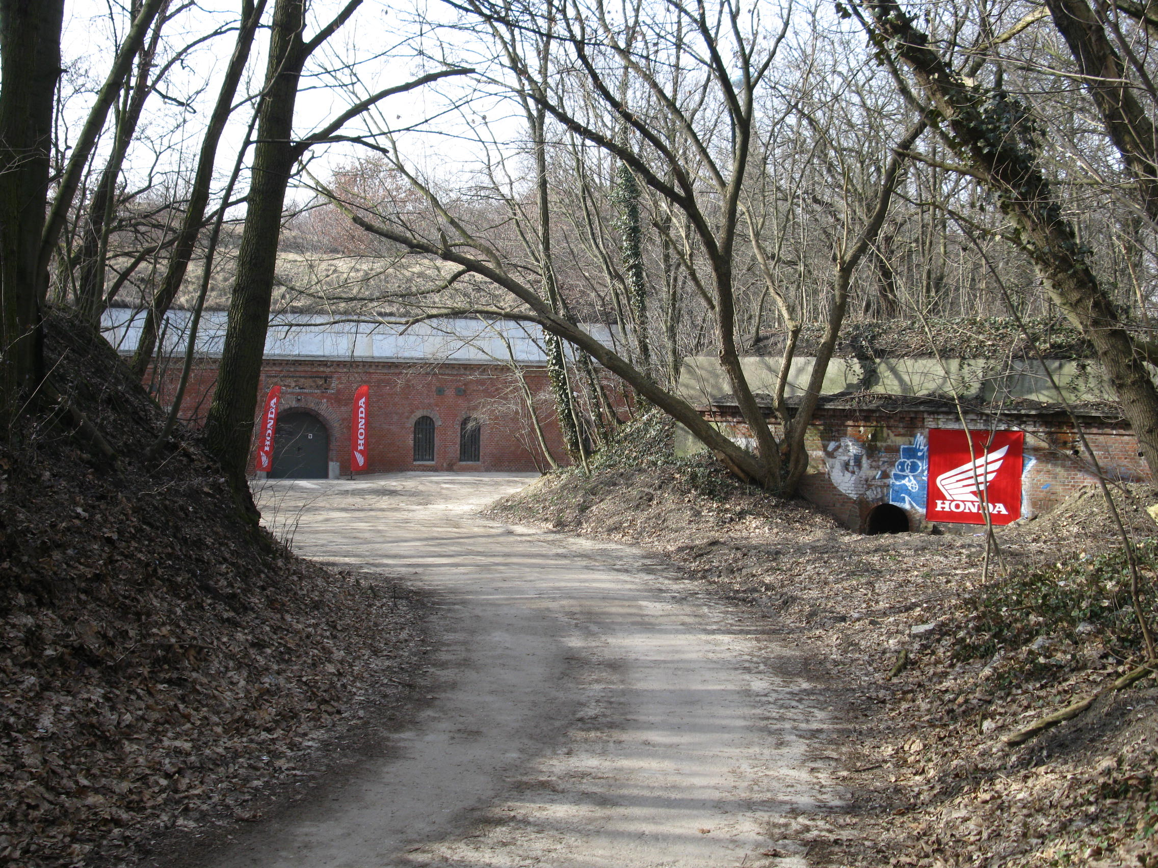 Dziedziniec wjazdowy do fortu